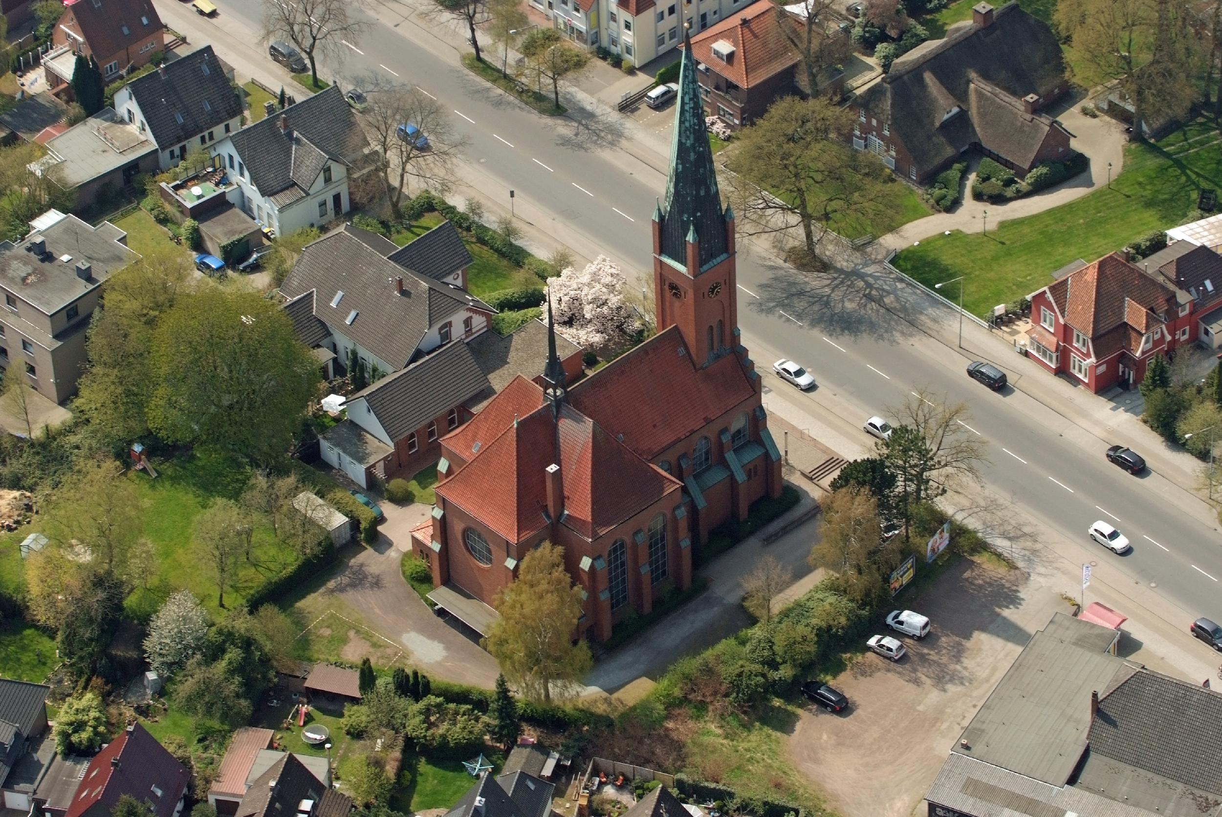 St.-Ansgari-Kirche, Oldenburg-Eversten / Fotoflug von Nordholz-Spieka nach Oldenburg und Papenburg